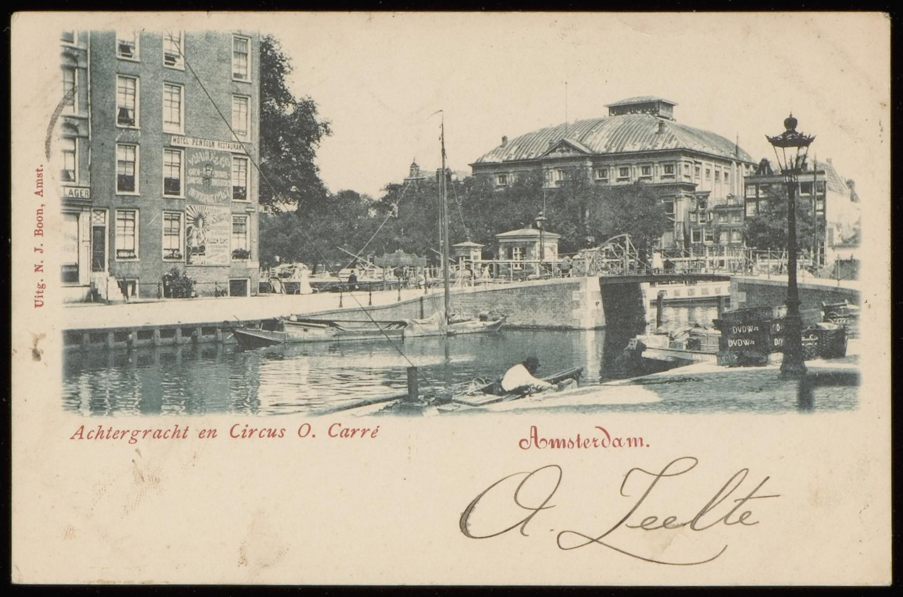 Beschrijving Achtergracht hoek Amstel met op de achtergrond theater Carré op de AmsteldijkIn het midden het sluiswachtershuis van de Amstelsluizen. Uitgave N.J. Boon, AmsterdamDocumenttype prentbriefkaartVervaardiger Boon, N.J. (uitgever)Collectie Collectie Stadsarchief Amsterdam: prentbriefkaartenDatering 1900 ca.Geografische naam AchtergrachtInventarissen PBKD00090000001 Generated with Dememorixer